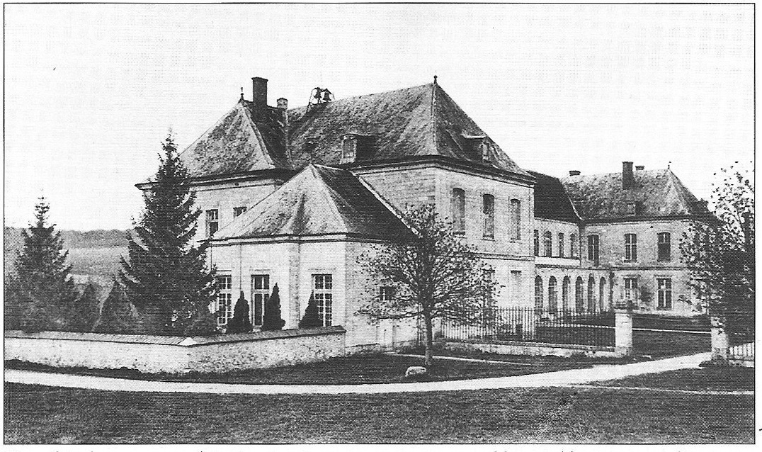 d'après une Carte postale de Arcis, l'abbaye d' Igny .